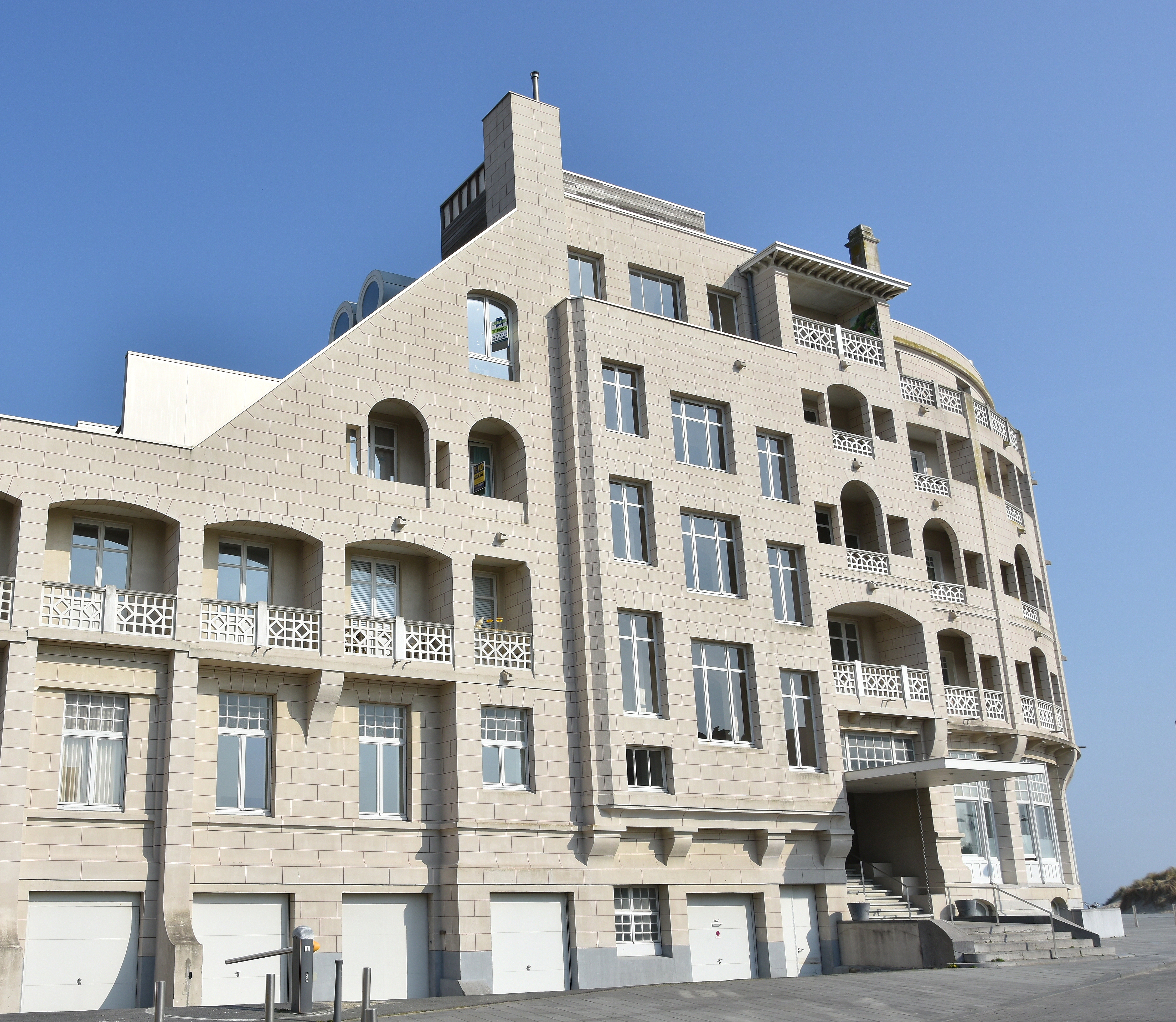 Grand Hôtel Bellevue Westende, België